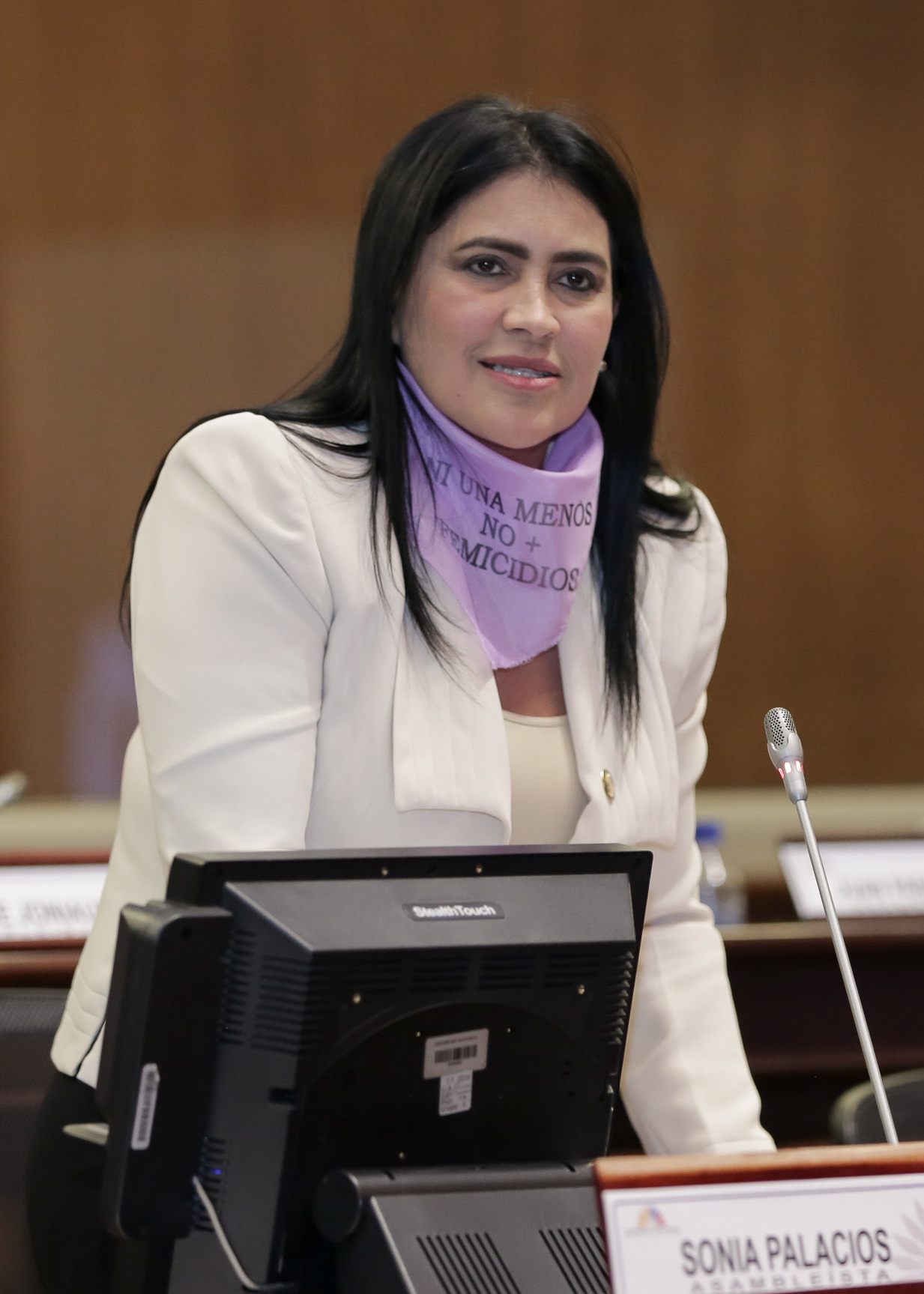 sonia palacios